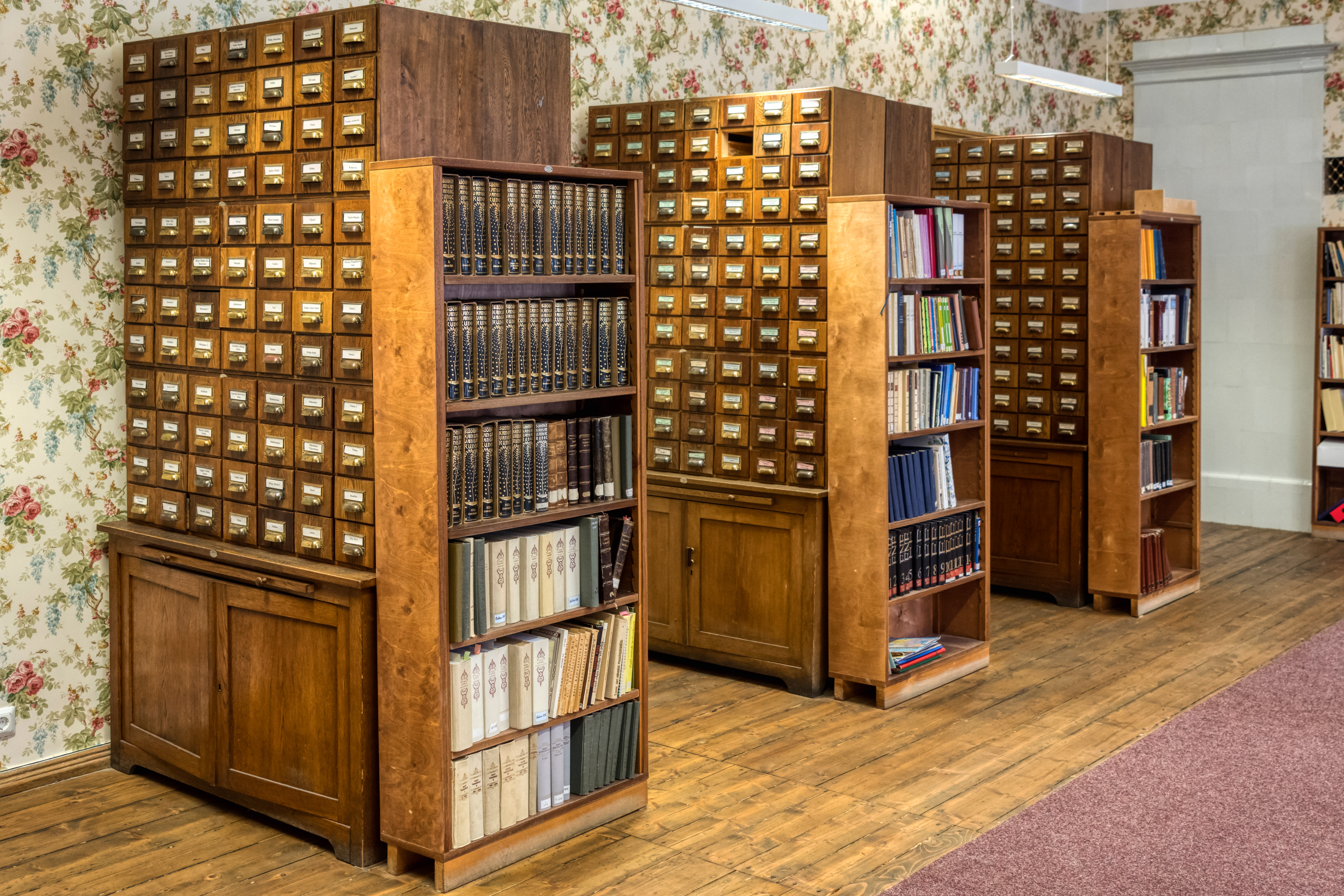 Kataloogikapid Eesti Rahvaluule Arhiivis